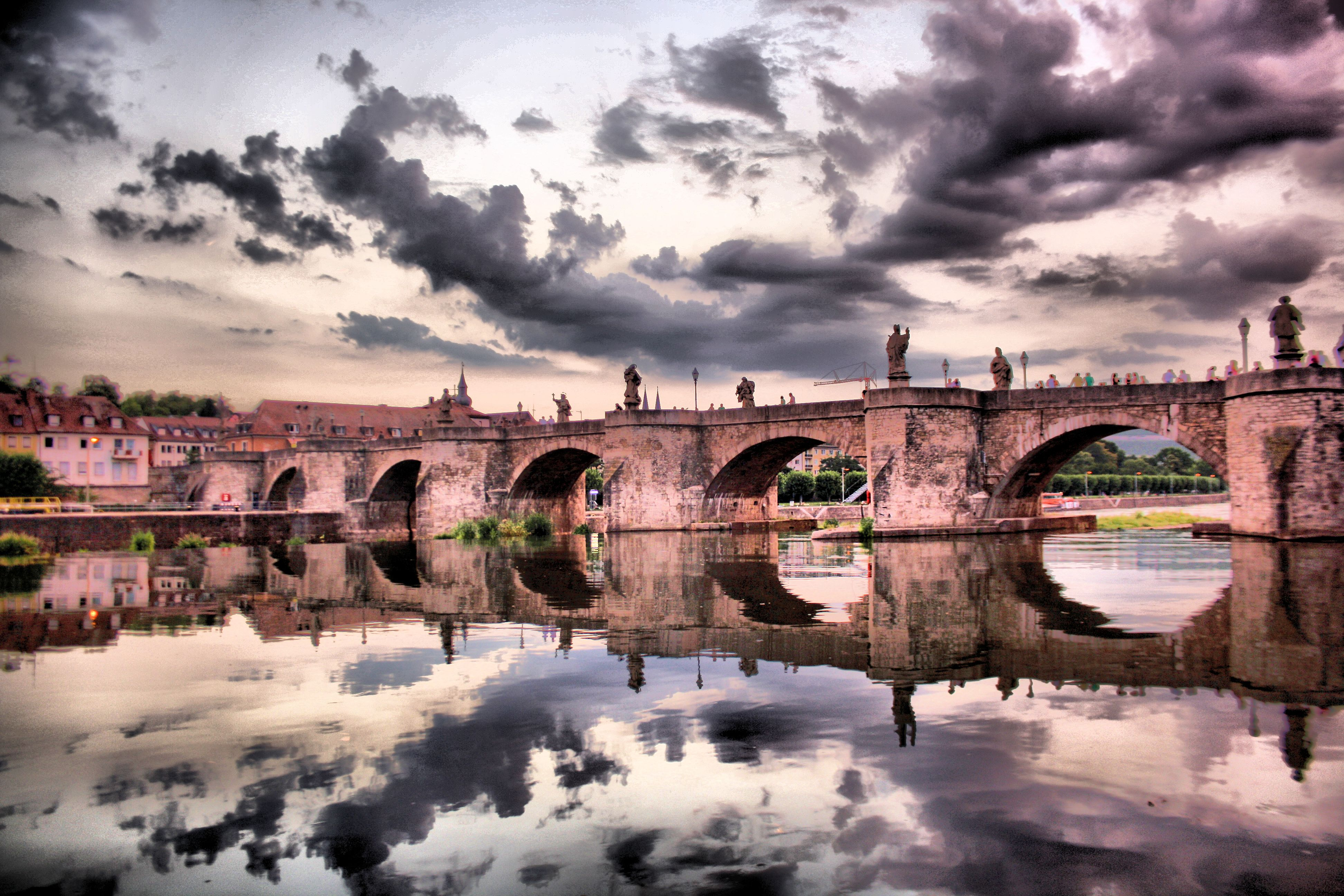 Würzburg, Alte MainbrückeThis is a photograph of an architectural monument.